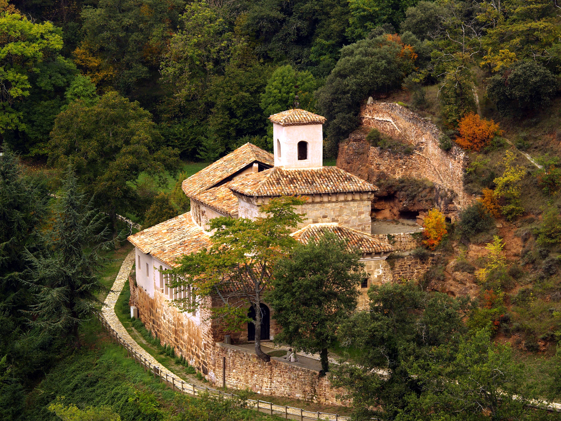 Monasterio de Suso. San Millán de la Cogolla. La Rioja. Patrimonio de la Humanidad